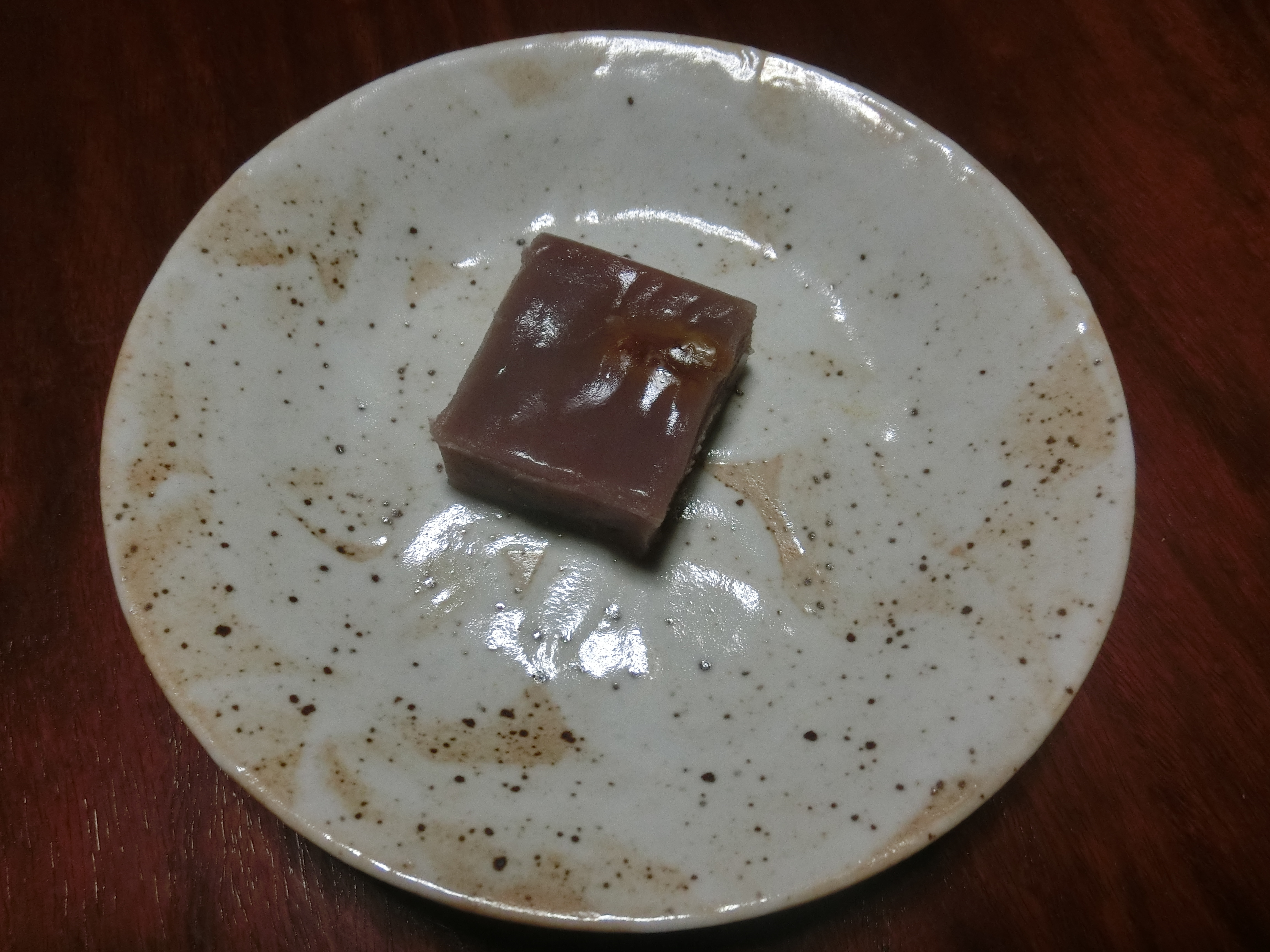 青森県の郷土菓子、久滋良餅。